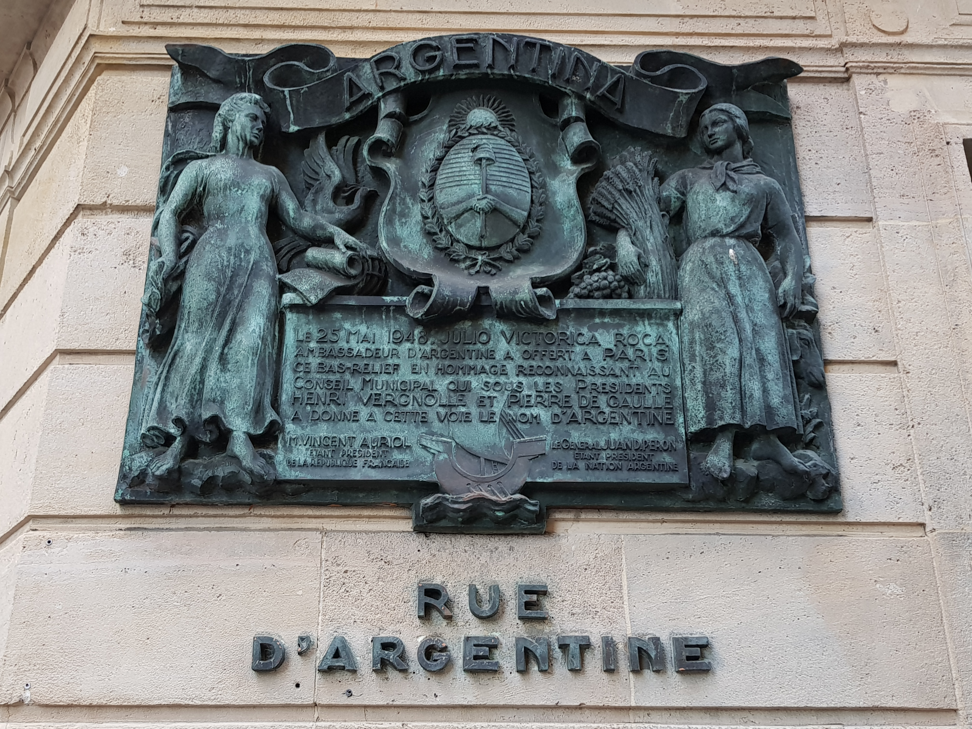 Bas-relief placé au début de la rue d'Argentine, Paris 16e.